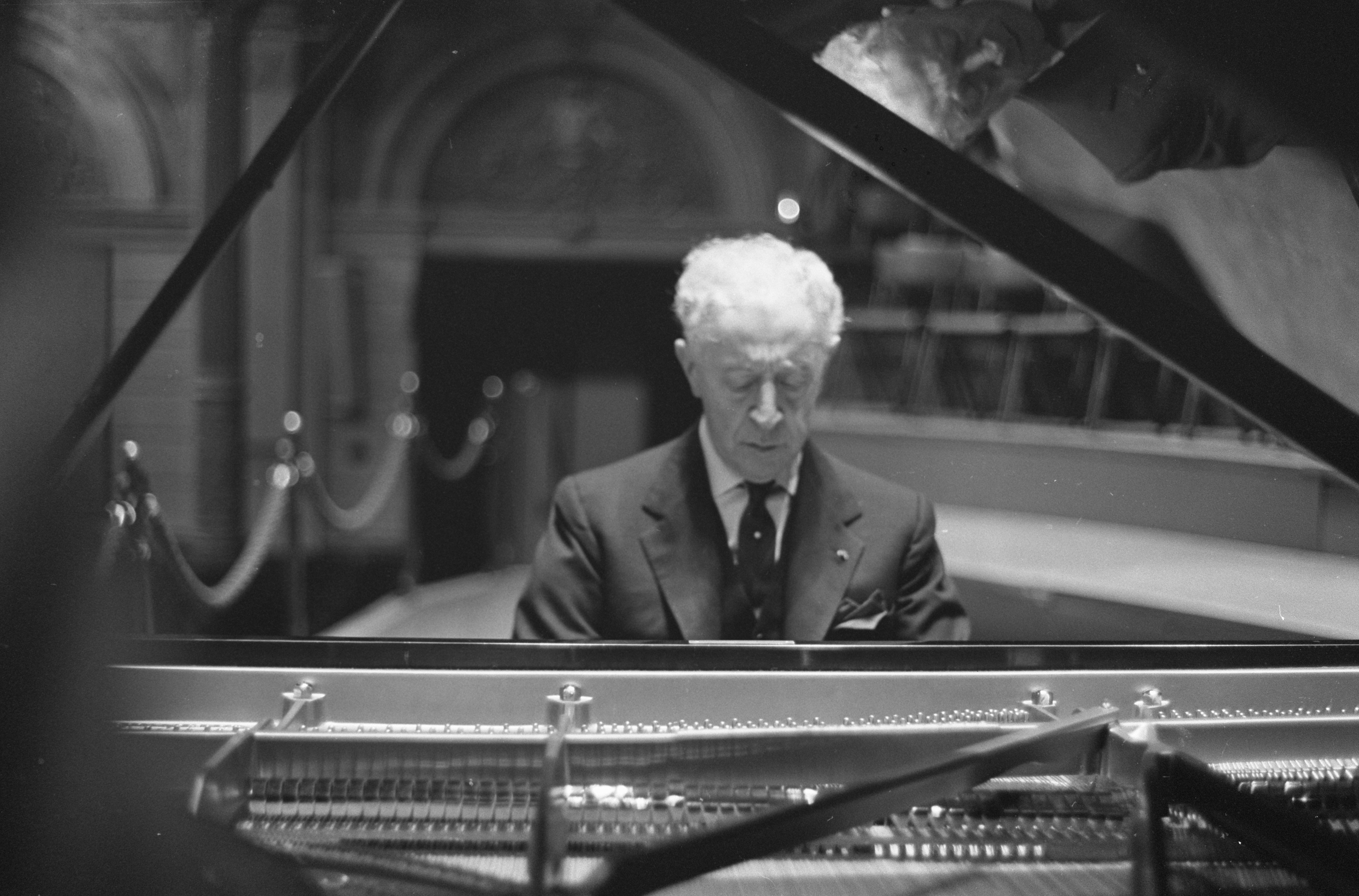 Collectie / Archief : Fotocollectie Anefo Reportage / Serie : [ onbekend ] Beschrijving : Optreden Arthur Rubinstein in Concertgebouw Datum : 13 februari 1962 Locatie : Amsterdam, Noord-Holland Trefwoorden : musici, pianisten, portretten Persoonsnaam : Rubinstein, Arthur Fotograaf : Rossem, Wim van / Anefo Auteursrechthebbende : Nationaal Archief Materiaalsoort : Negatief (zwart/wit) Nummer archiefinventaris : bekijk toegang 2.24.01.05 Bestanddeelnummer : 913-5229